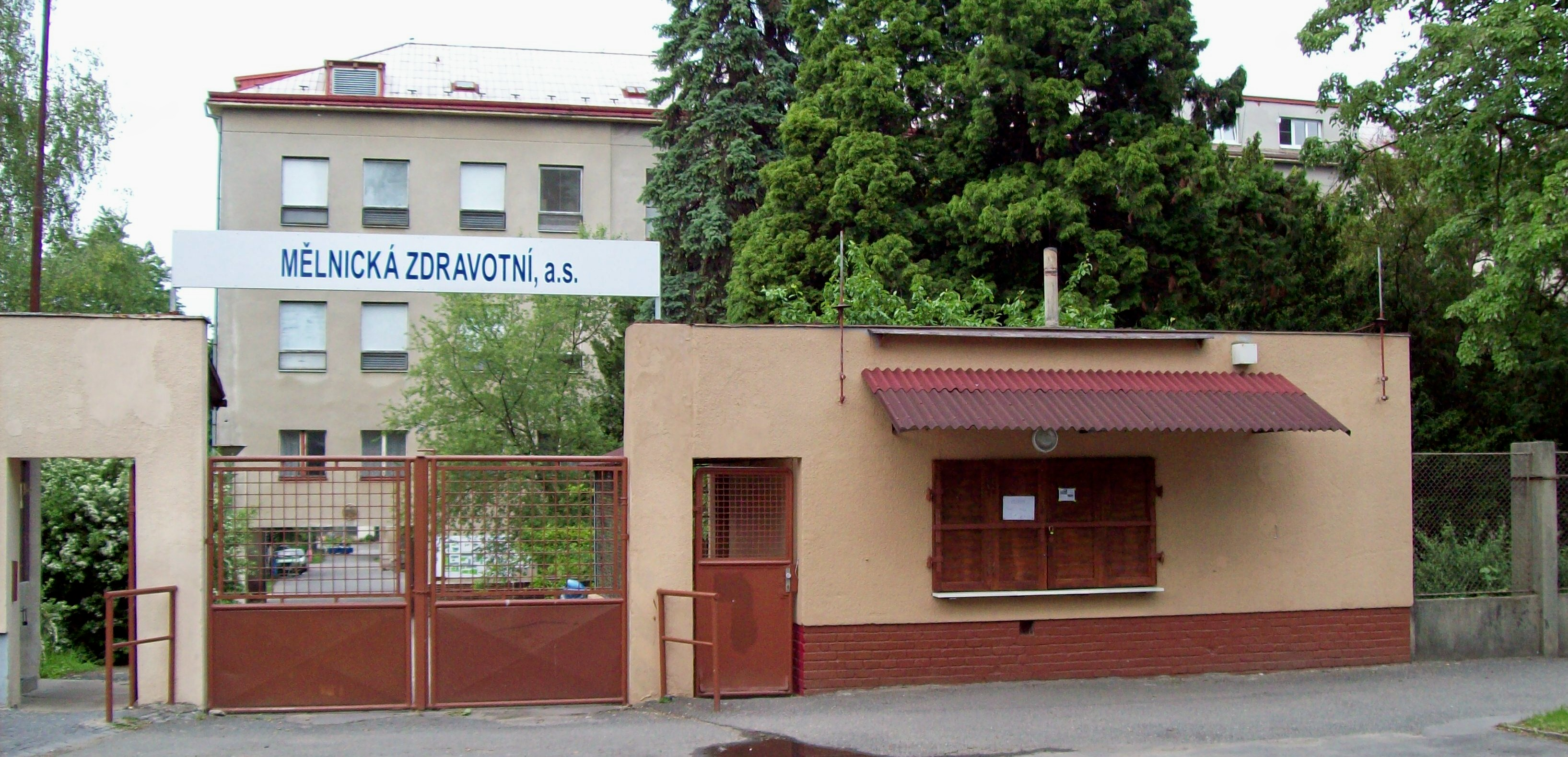 Vchod do nemocnice Mělník z Pražské ulice, součásti Nemocnice s poliklinikou Mělník. Vedle vchodu vpravo stánek s občerstvením. V nemocnici zobrazen Pavilon A (chirurgie I, II a ARO), v průchodu je umístěna pamětní deska.